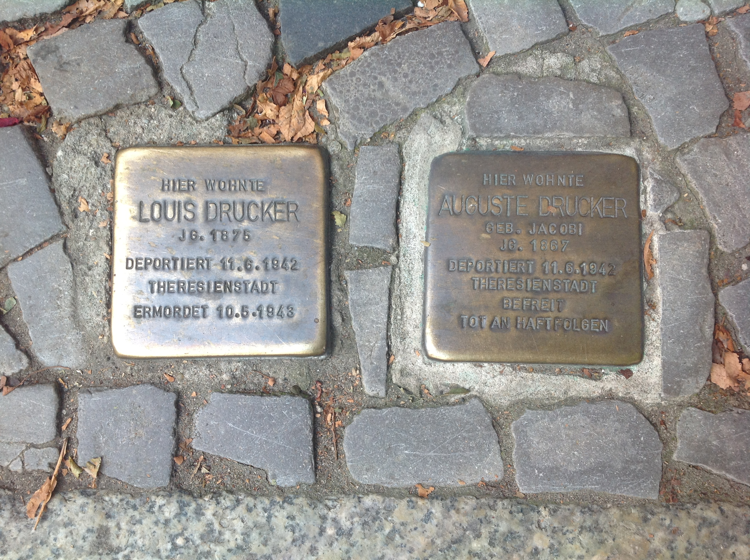 Kompastuskivet, jotka on asennettu Berliiniin, osoitteeseen Dahlmannstrasse 6, ulko-ovien eteen jalkakäytävlle.